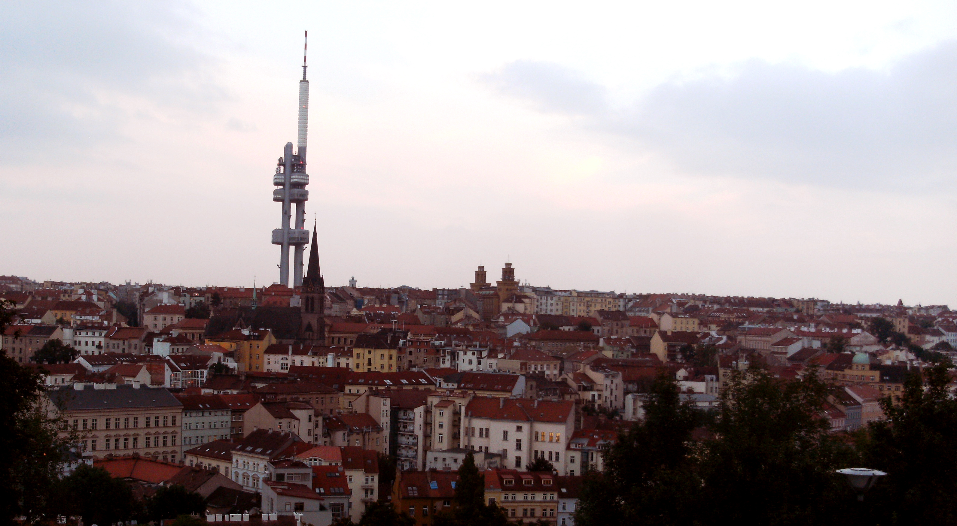 pohled na Žižkov